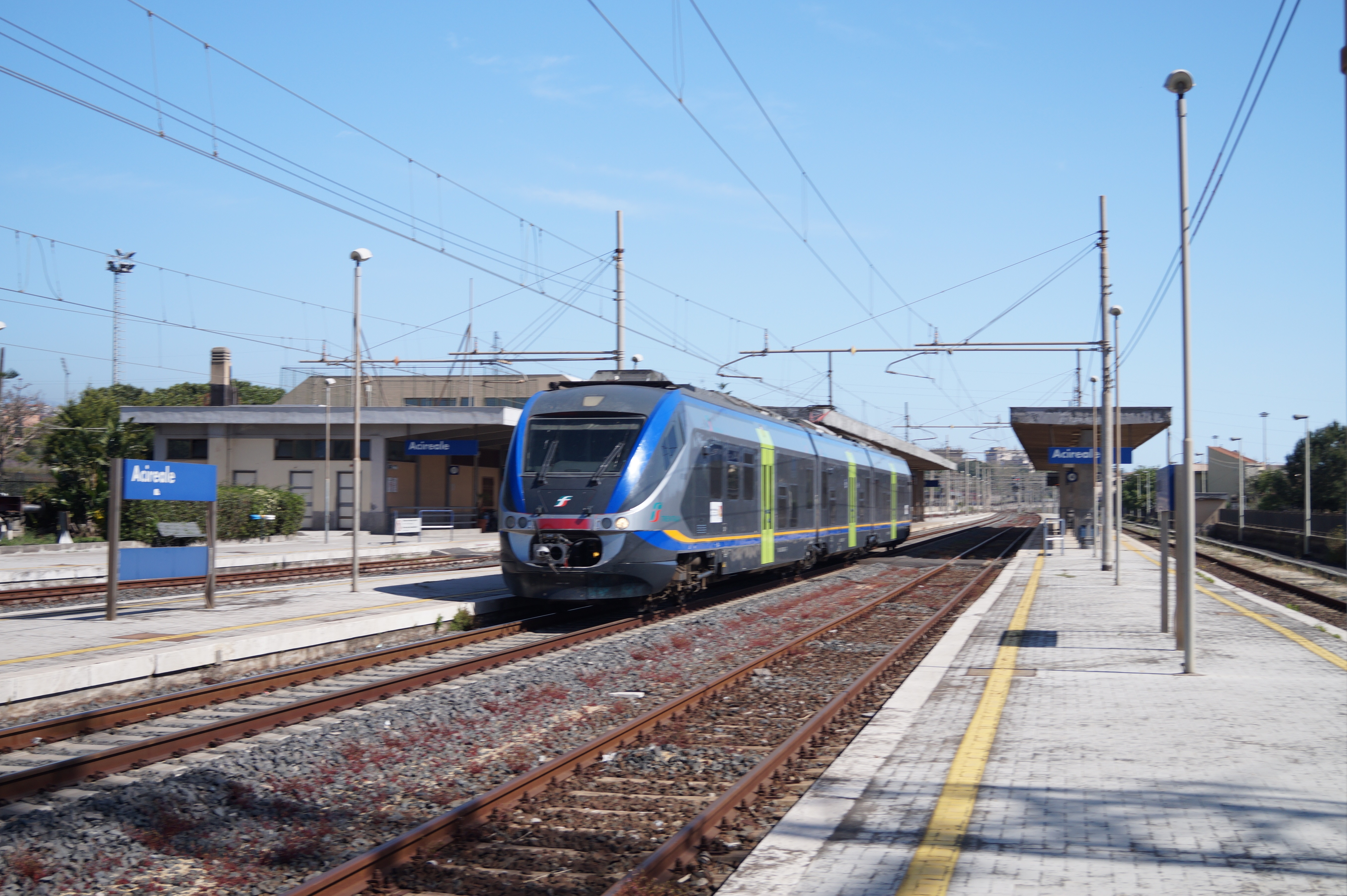 Bahnhof Acireale (Bahnstrecke Messina-Siracusa)